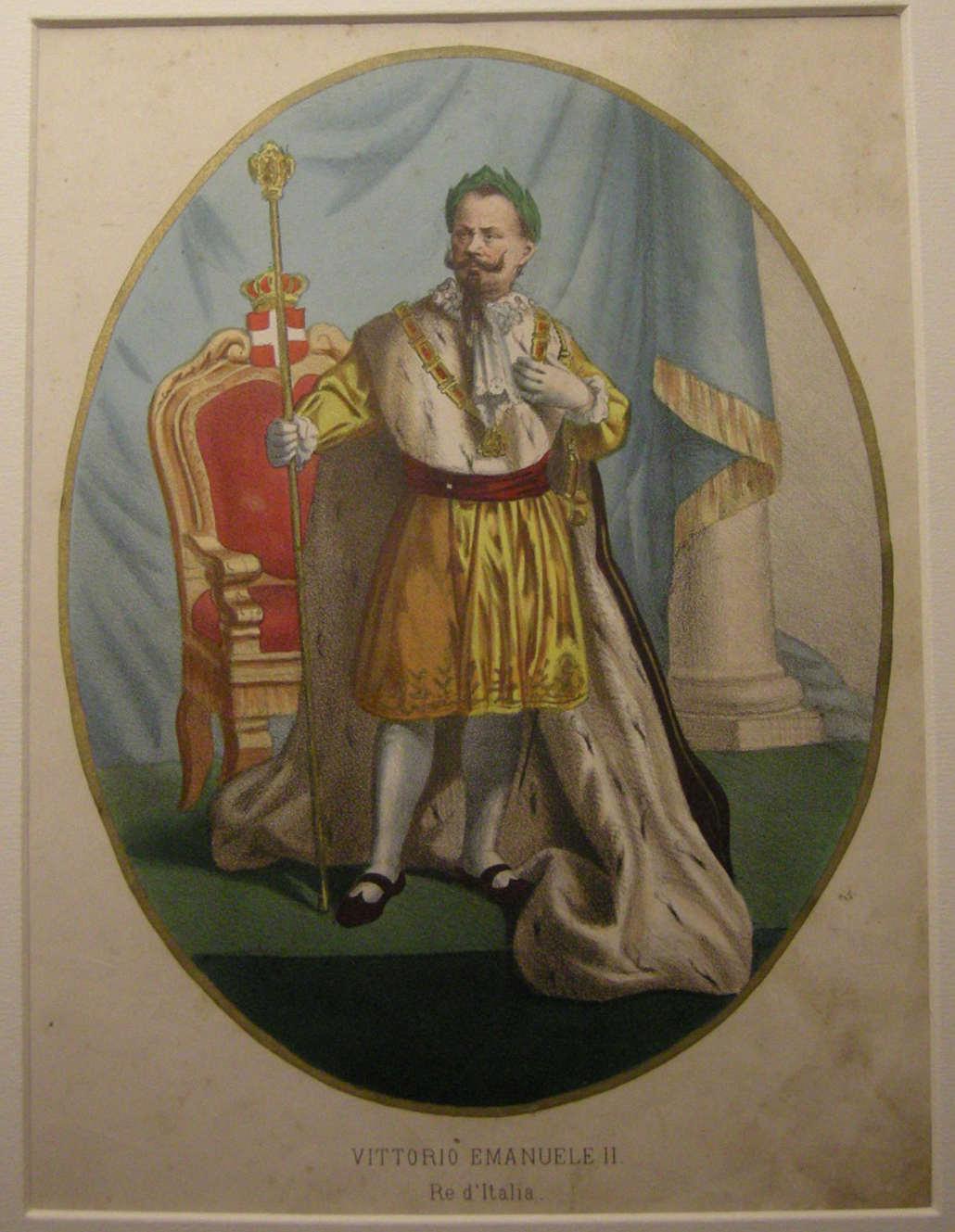 Litografia ballagny, fine XIX sec. vittorio emanuele II